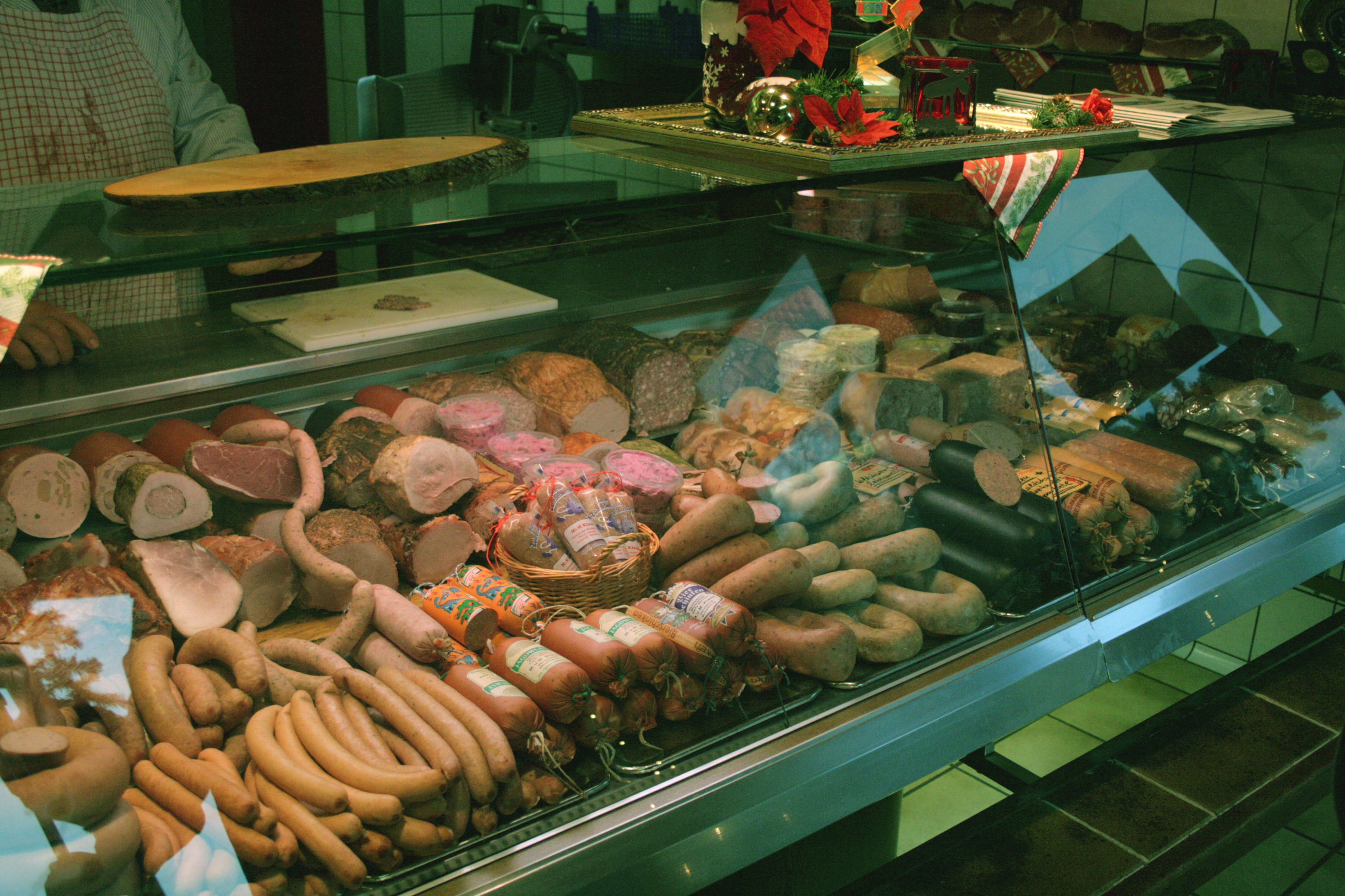 Aufschnitt und Wurst in der Auslage einer Metzgerei (Metzgerei Klaus, Versmold, Germany)